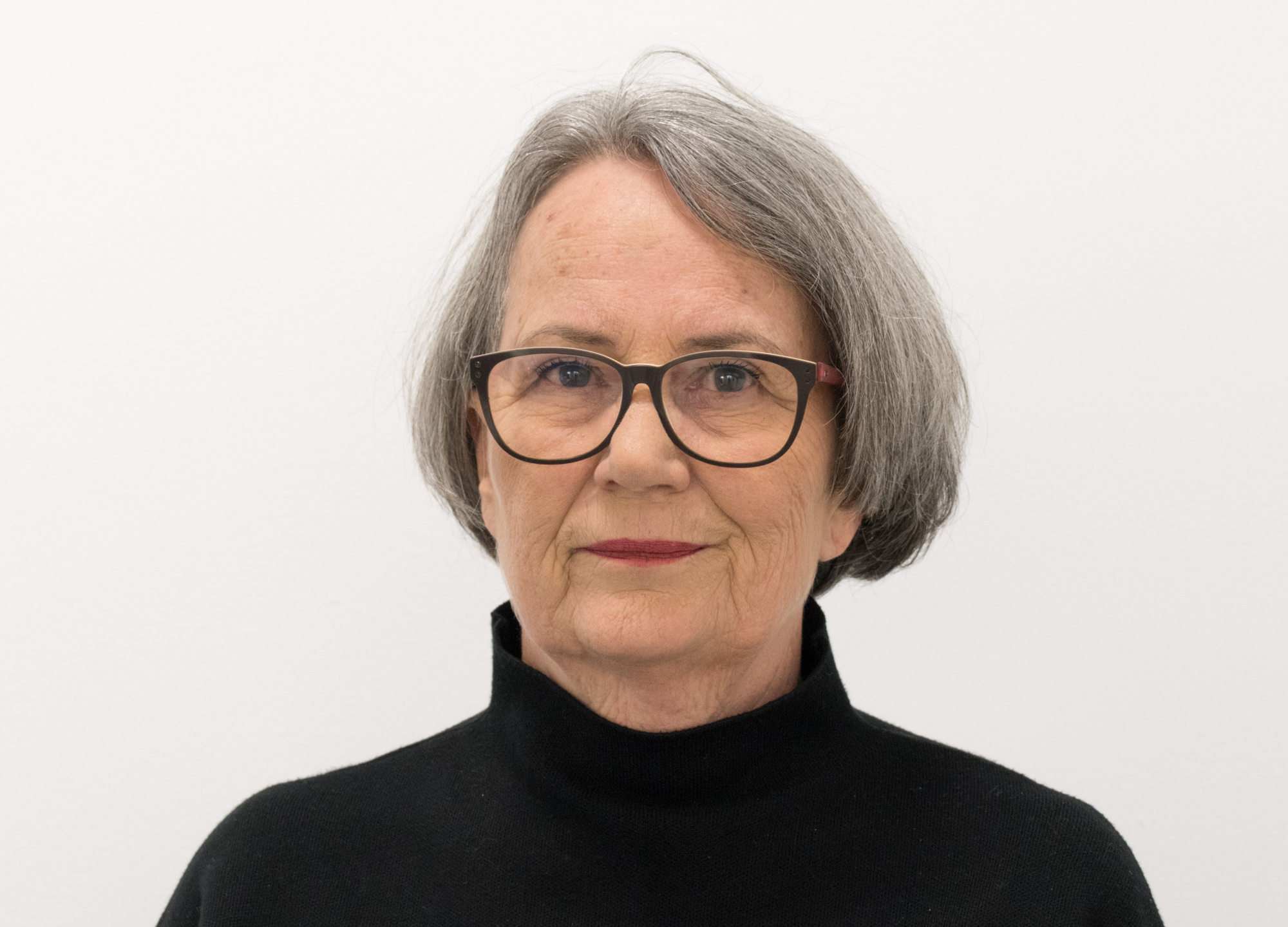 Annerose Riedl in der Galerie 422 in Gmunden